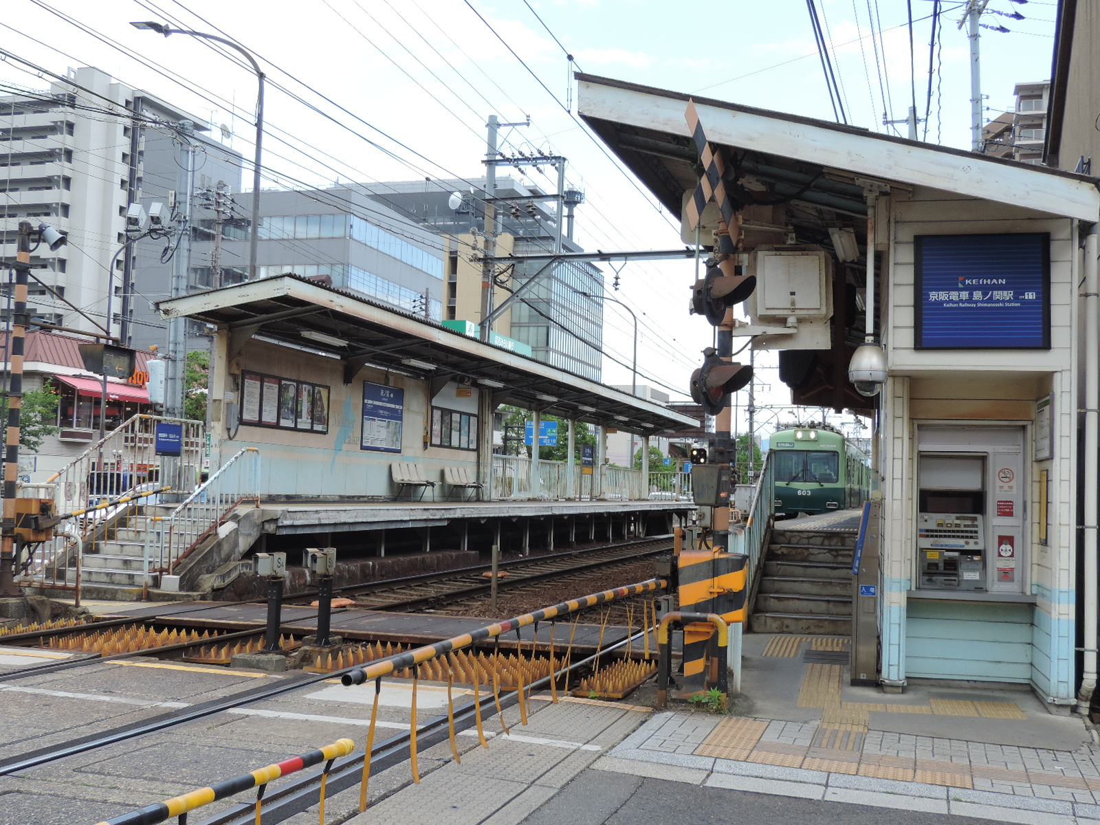 島の関駅。2020年5月撮影。